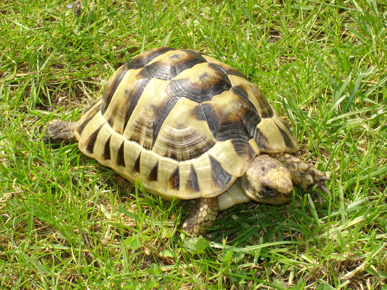 tortue mauresque à l'âge de trois ans (Elle répond au nom de Fakroun)